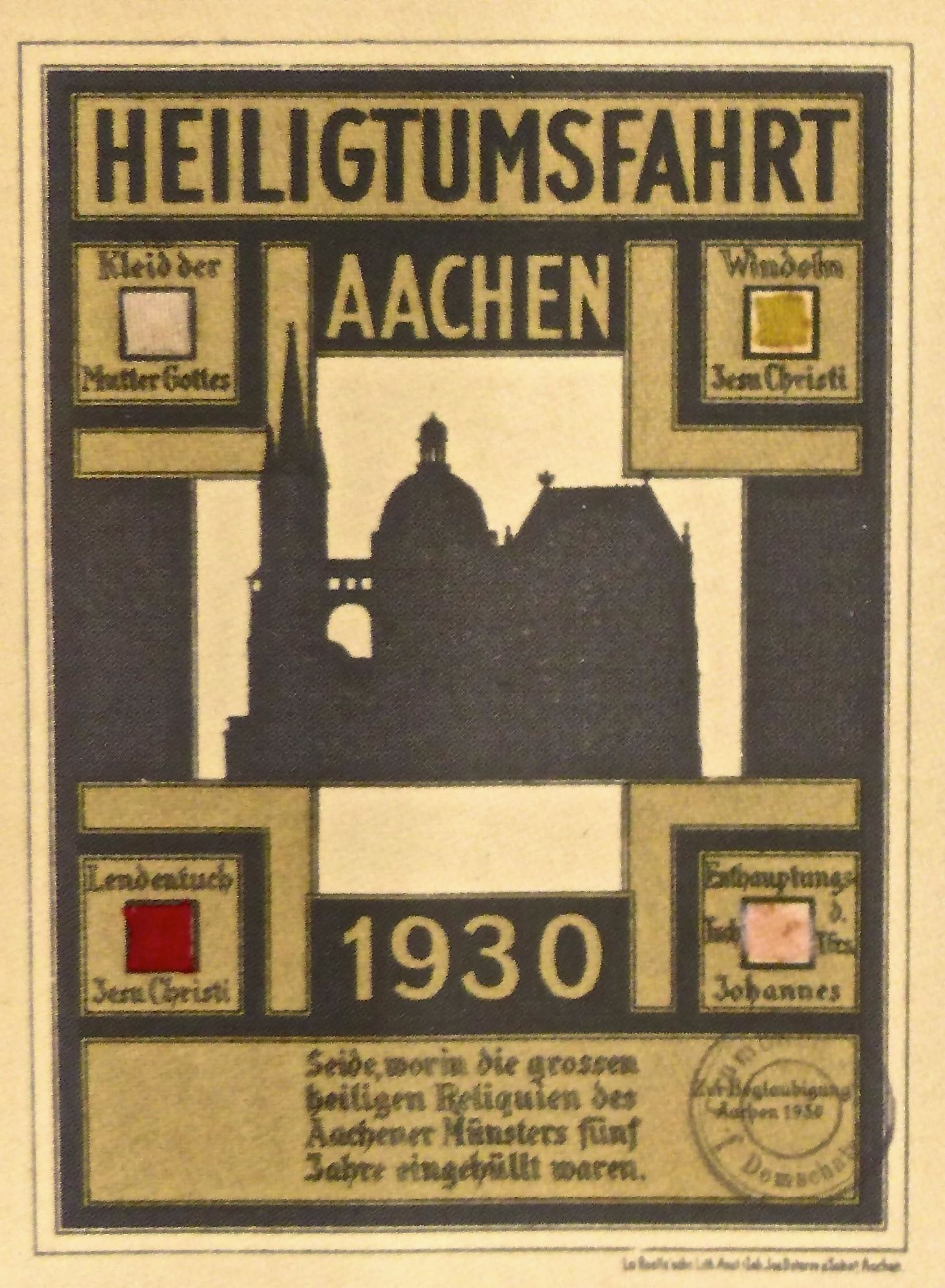 Fotografie einer Andenkenkarte zur Heiligtumsfahrt 1930 in Aachen